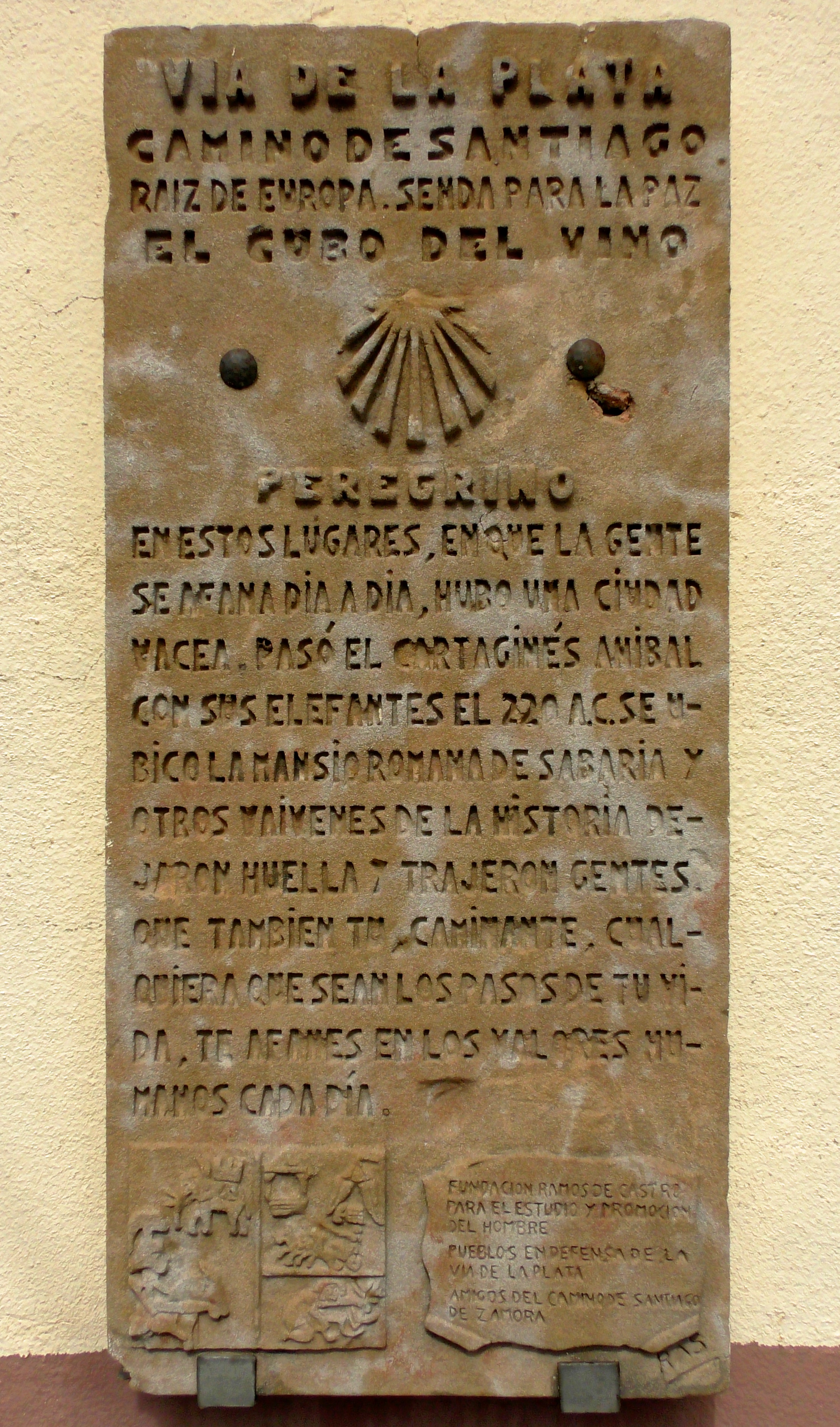 El Cubo del Vino. Iglesia